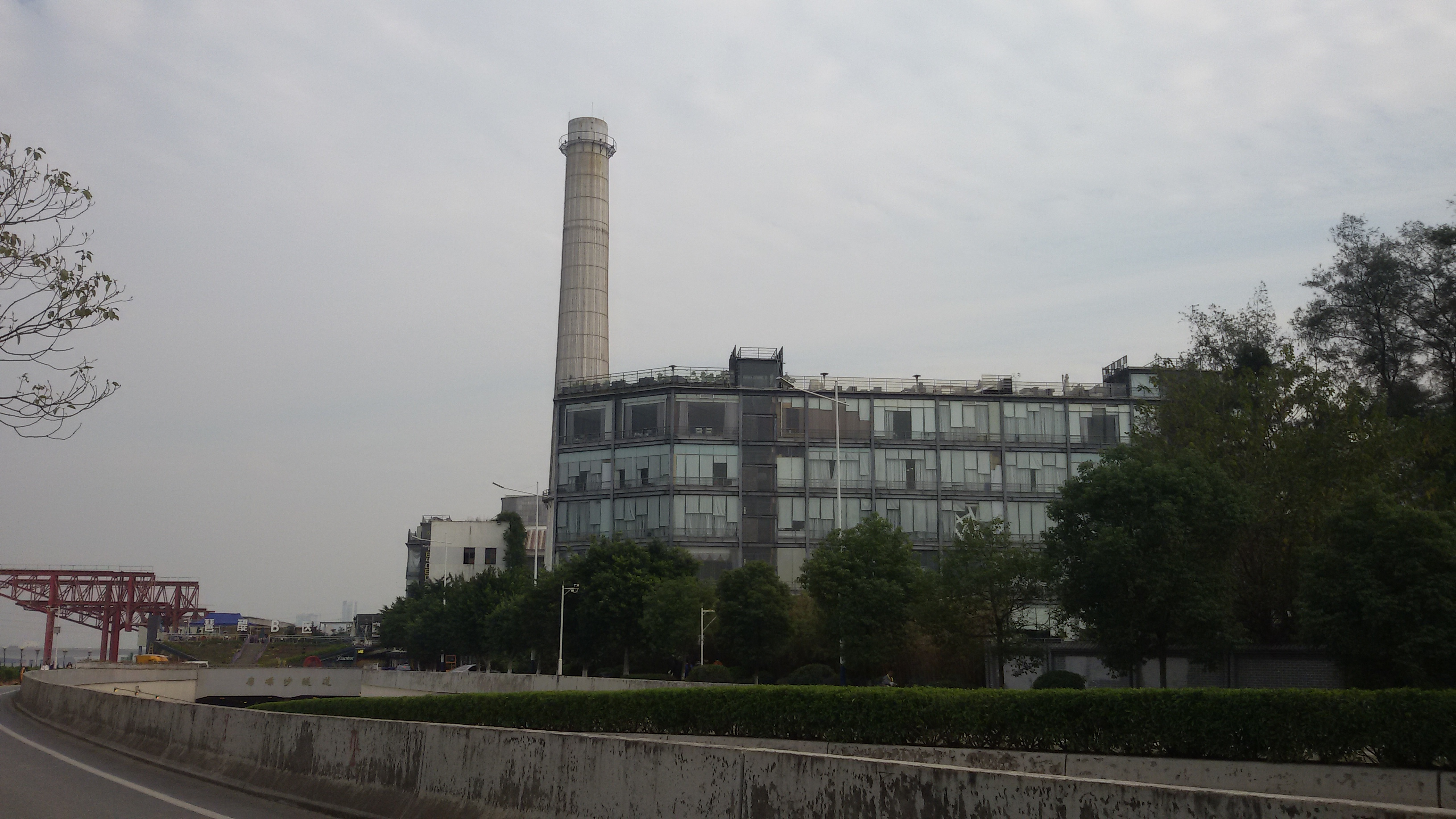 粵語: 珠江·英博軌跡啤酒博物館